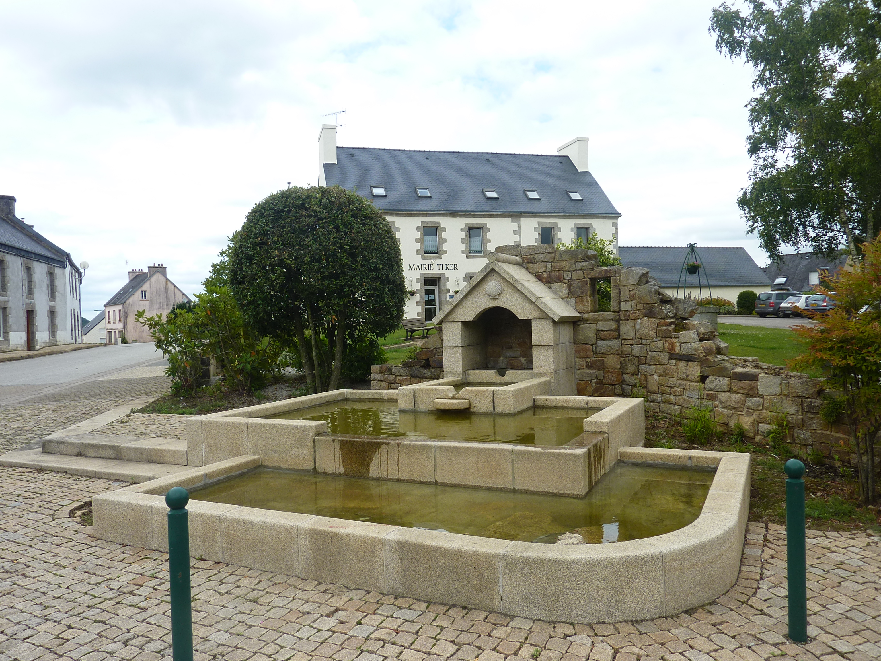 Collorec : la fontaine devant la mairie